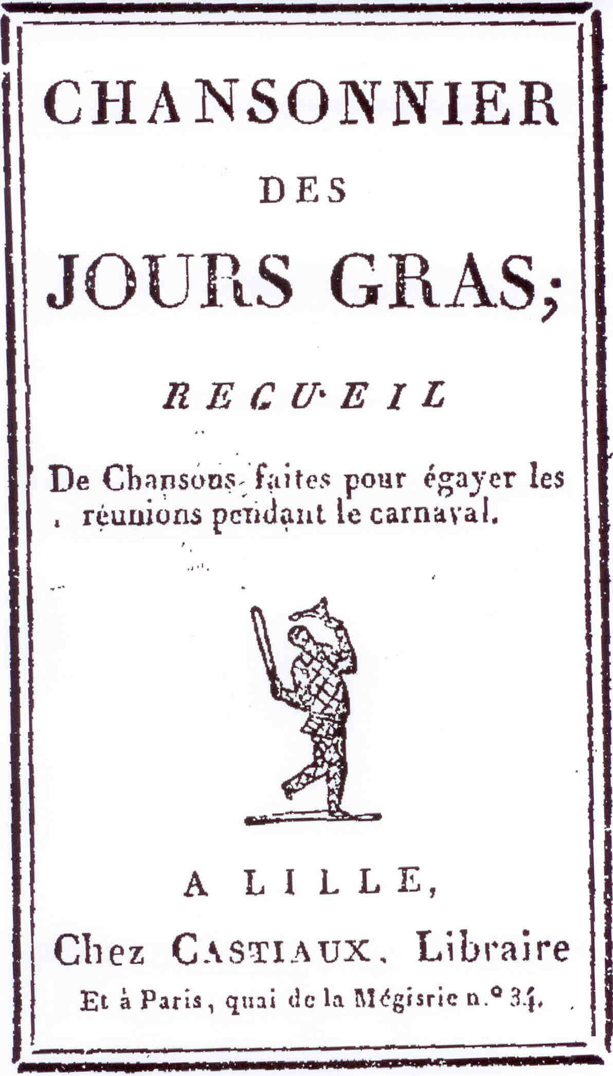 Couverture d'un recueil de chansons de Carnaval